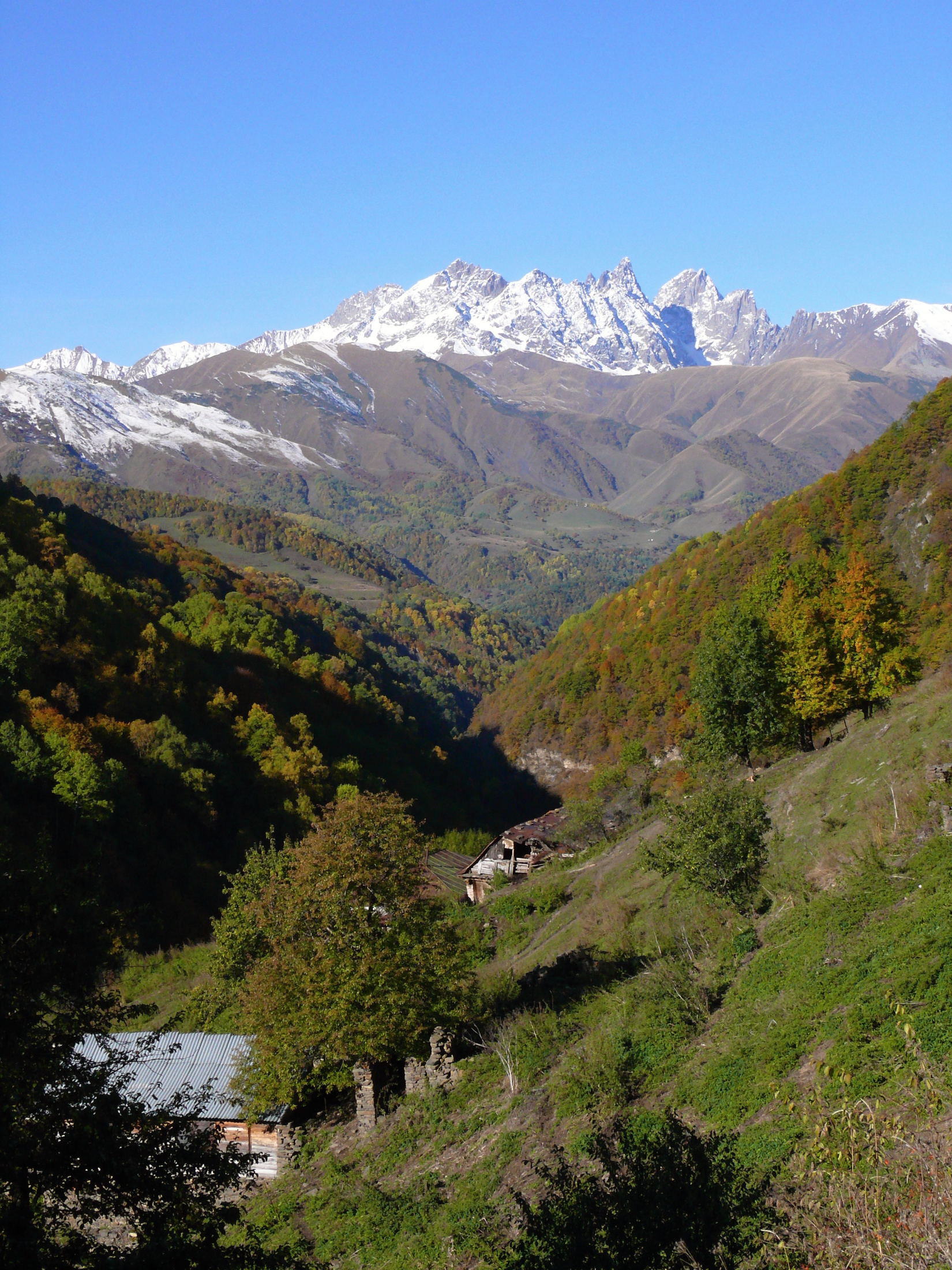 Údolí Gudanisckali, soustava vrcholů Čauchi (uprostřed), Roškachorchi (při pravém okraji). V popředí osada Biso.